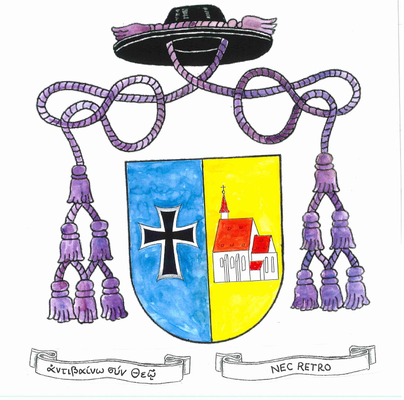 Das Wappen von Prälat Fahrner weist einen blau-goldenen Grund auf, welcher die Heimat Niederösterreich repräseniert. Auf diesen ist das Kreuz des Deutschen Ritterordens und die Wolfgangskirche in Kirchberg am Wechsel zu sehen. Der Wappenspruch, teils griechisch, teils Latein, bedeutet "Mit Gott widerstehen - niemals zurück". Die Koreln sind violett und verweisen auf den Prälatenstand.